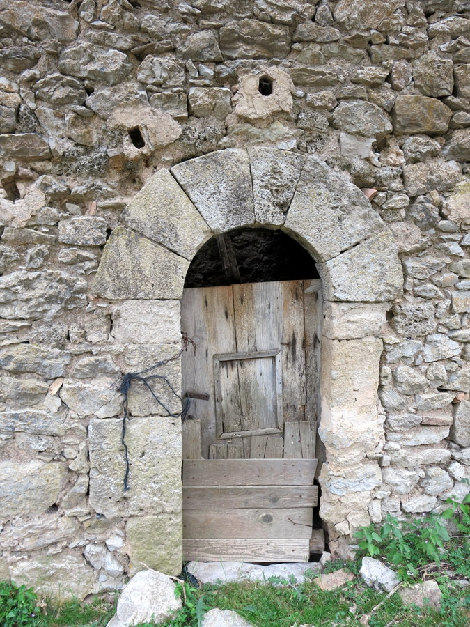 detall porta Torre de Riu, Castellar de Riu, Bergadà - Catalunya